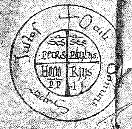 Esempio di Rota del XII proveniente da un privilegio solenne di papa Onorio II (1124-1130), particolare da Franz Steffens, Paleographie latin, Champion, Parigi 1910, tav. 80, p. 340